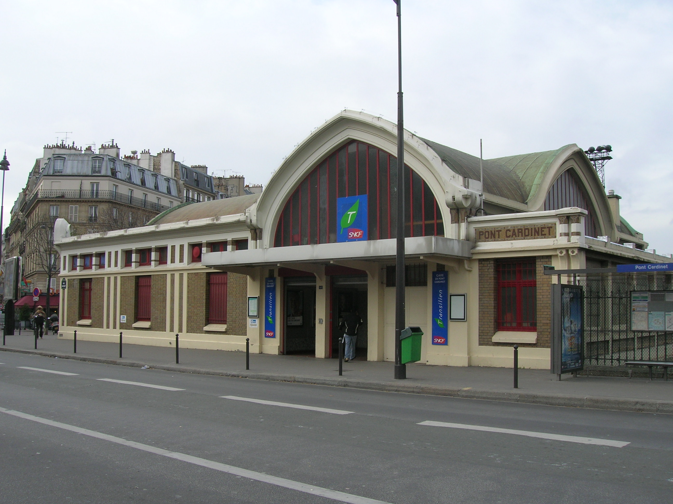 Gare de Pont-Cardinet côté rue, Paris.